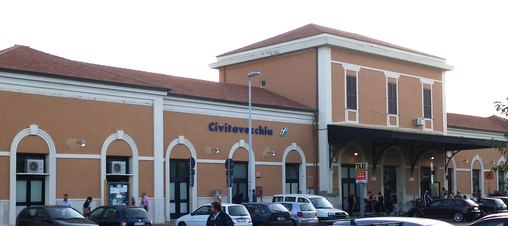 Lato campagna del fabbricato viaggiatori della stazione di Civitavecchia